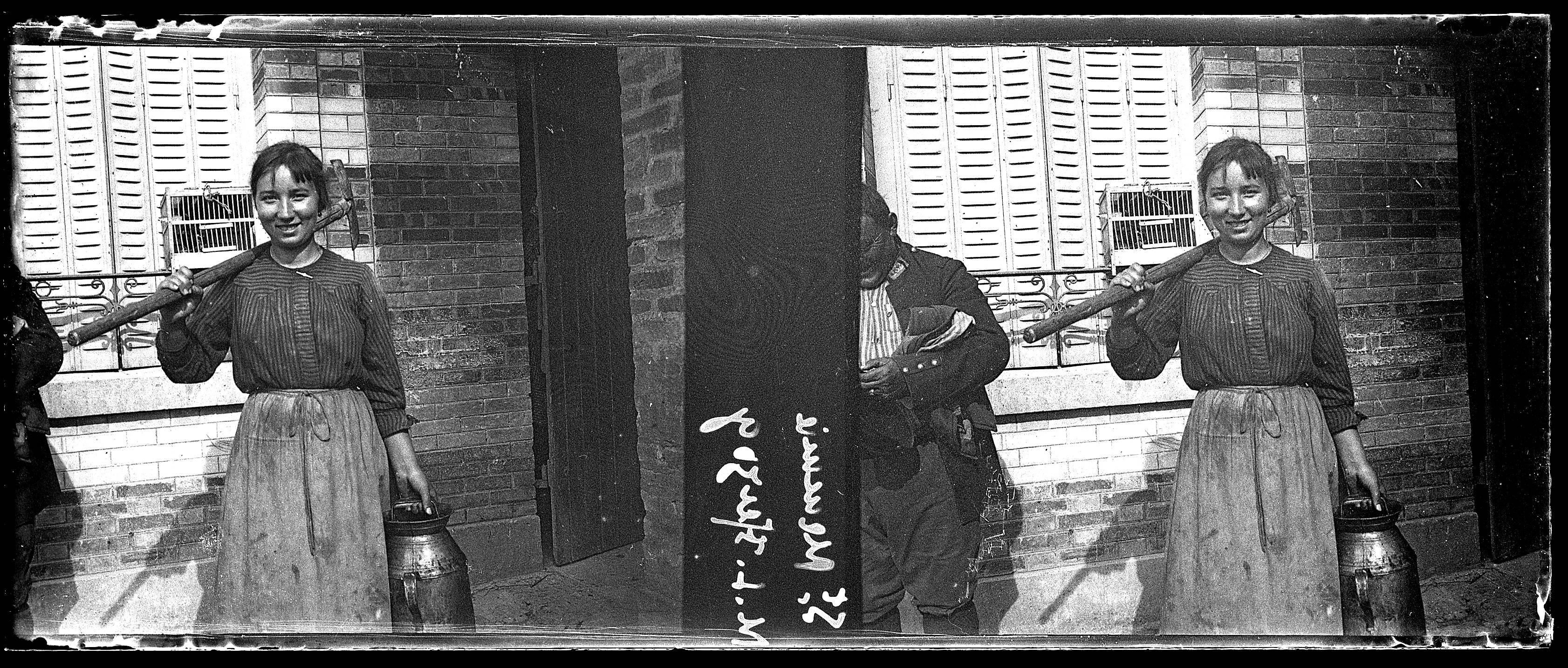 Portrait en pied de Mlle Herzog à Saint-Memmie (Marne). 1915. Guerre 1914-1918.